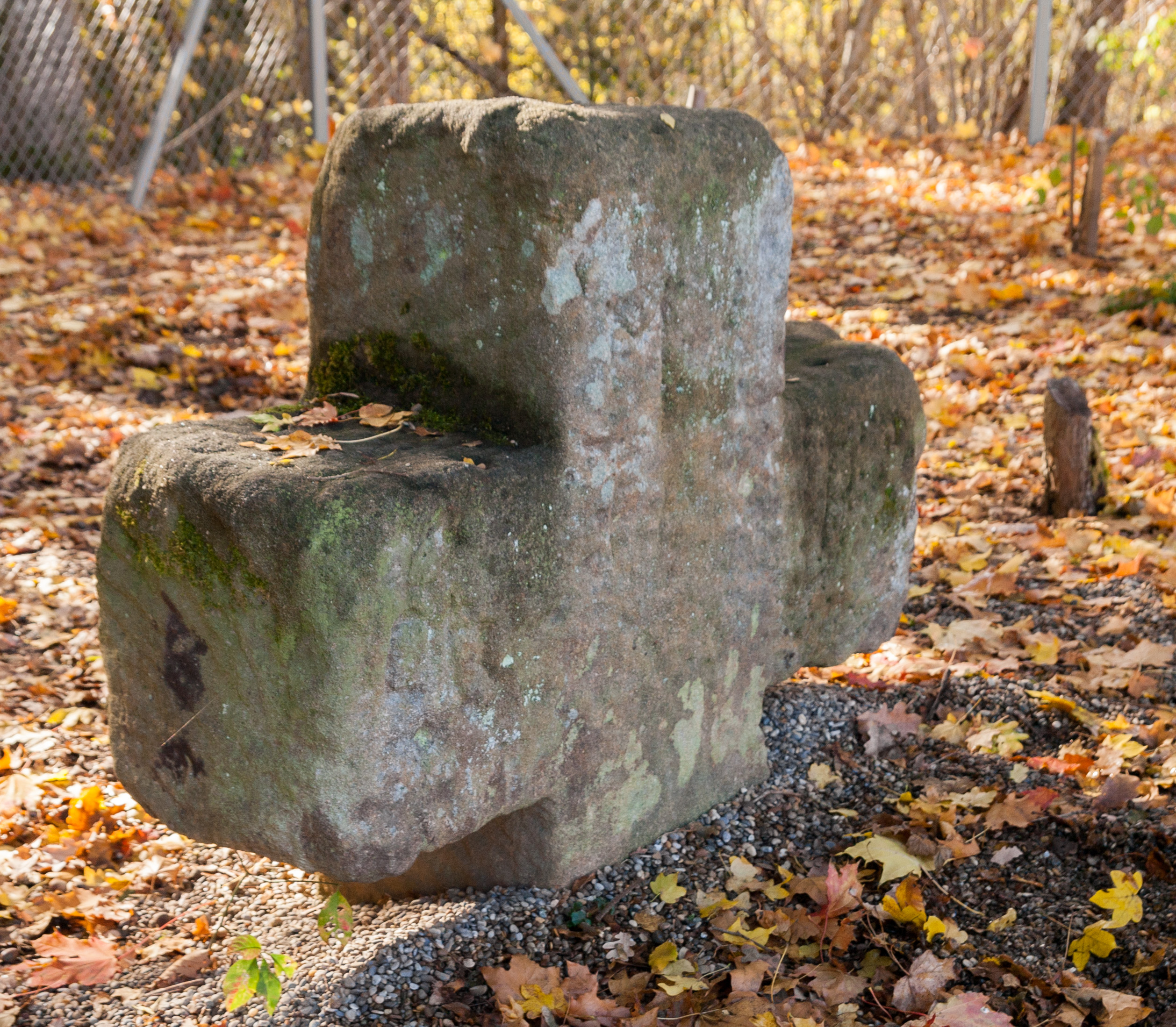 Steinkreuz, Schwarzenbruck, Raststätte Feucht West